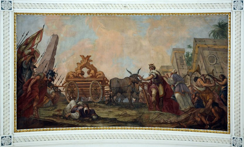 Usa stirbt, nachdem er die Bundeslade berührt hat. Deckenfresko in der Pfarrkirche Menzingen ZG